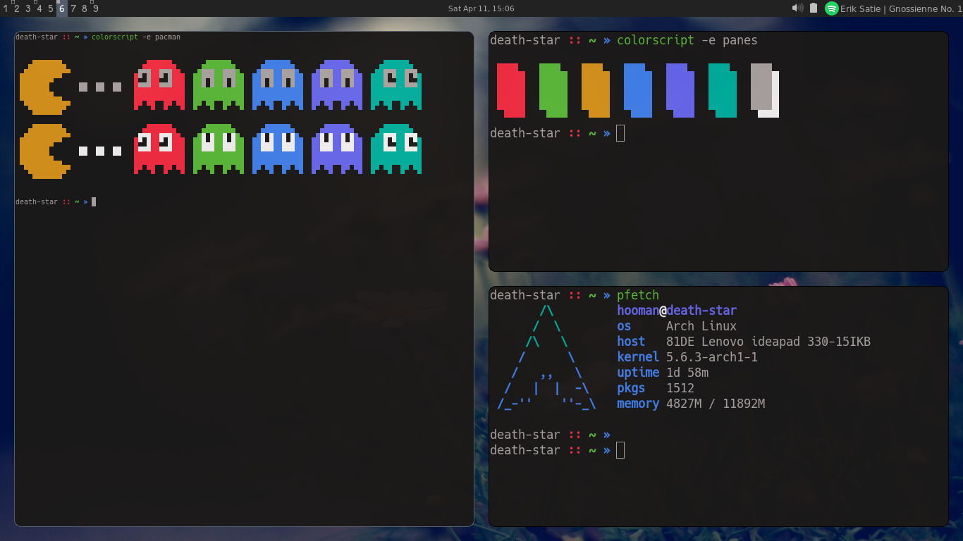 اسکرین شاتی از مدیر پنجره awesome